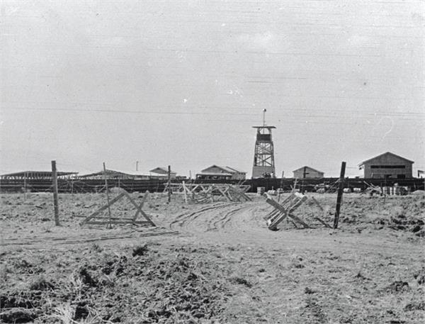 דפנה - בראשיתה